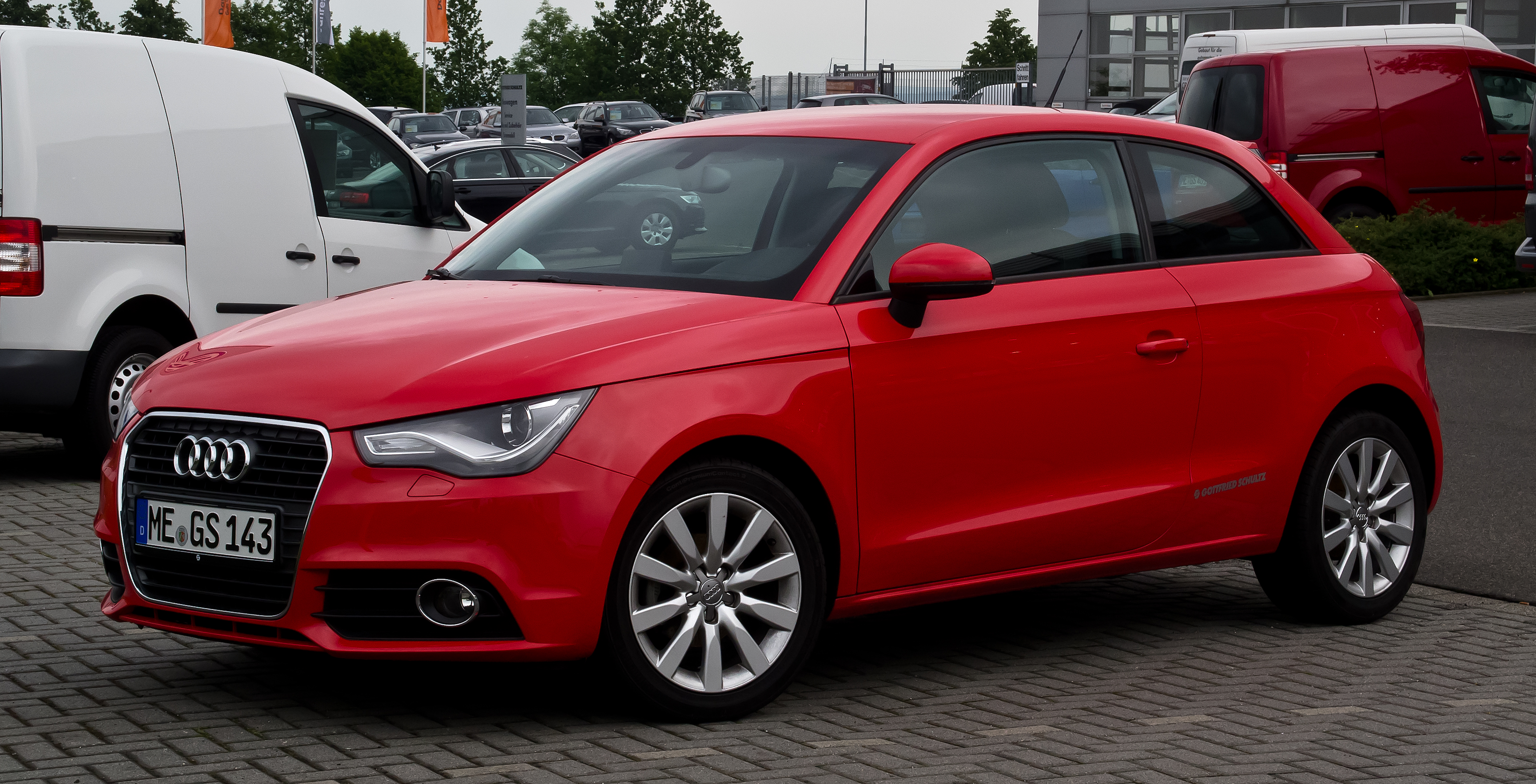 Audi A1 1.2 TFSI Ambition